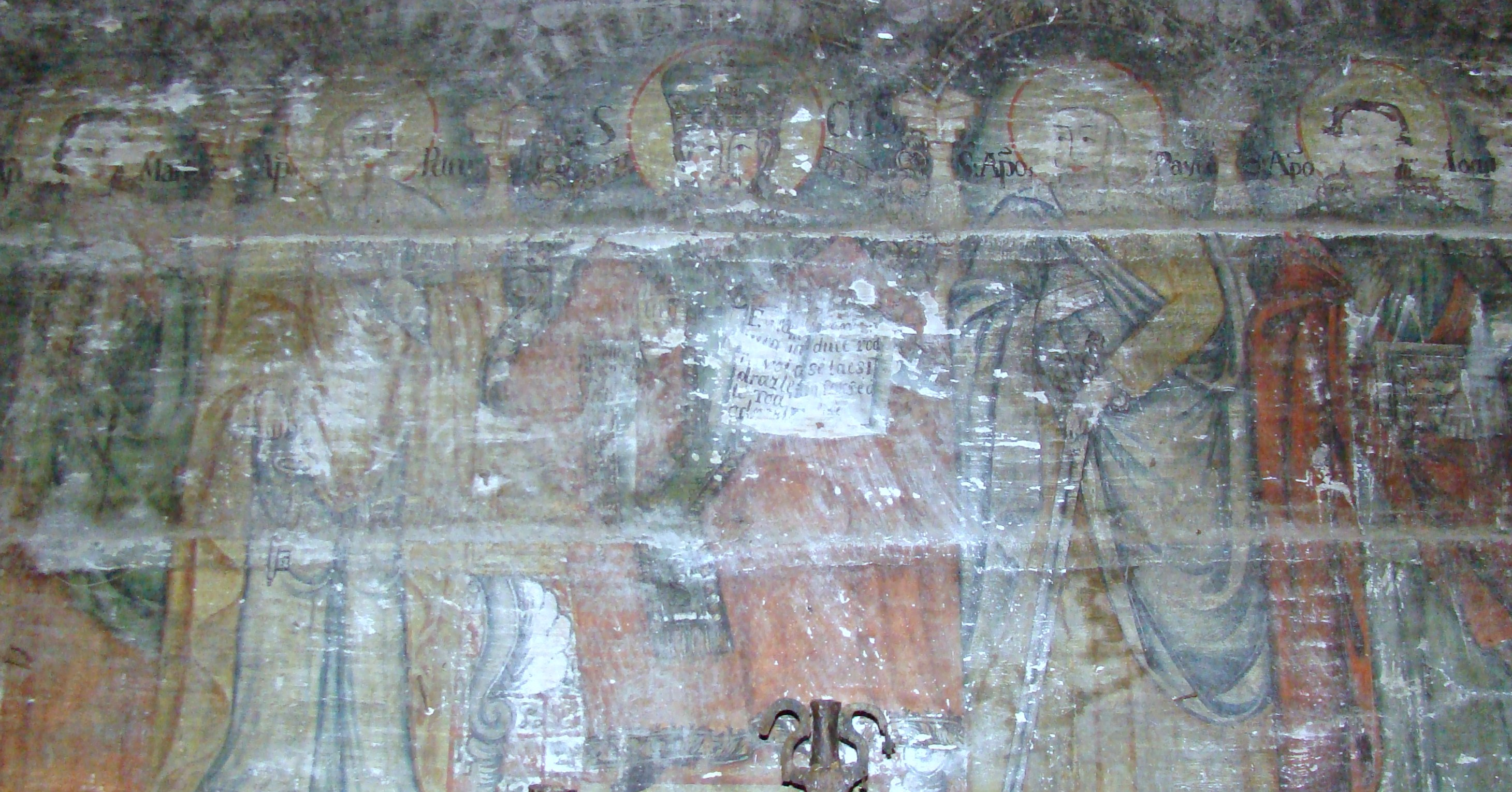 Biserica de lemn „Sfinții Arhangheli” din Berindu, județul Cluj